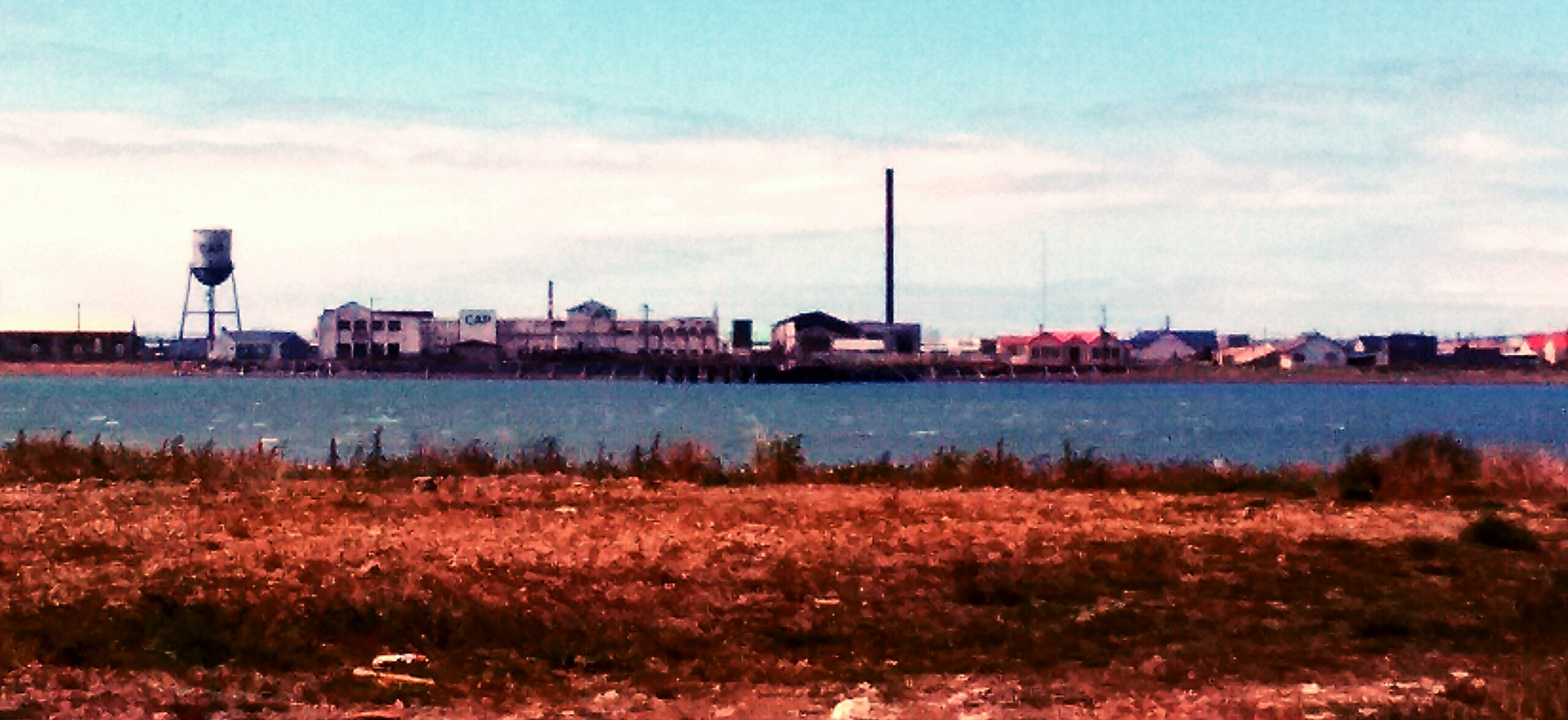 CAP desde Río Grande